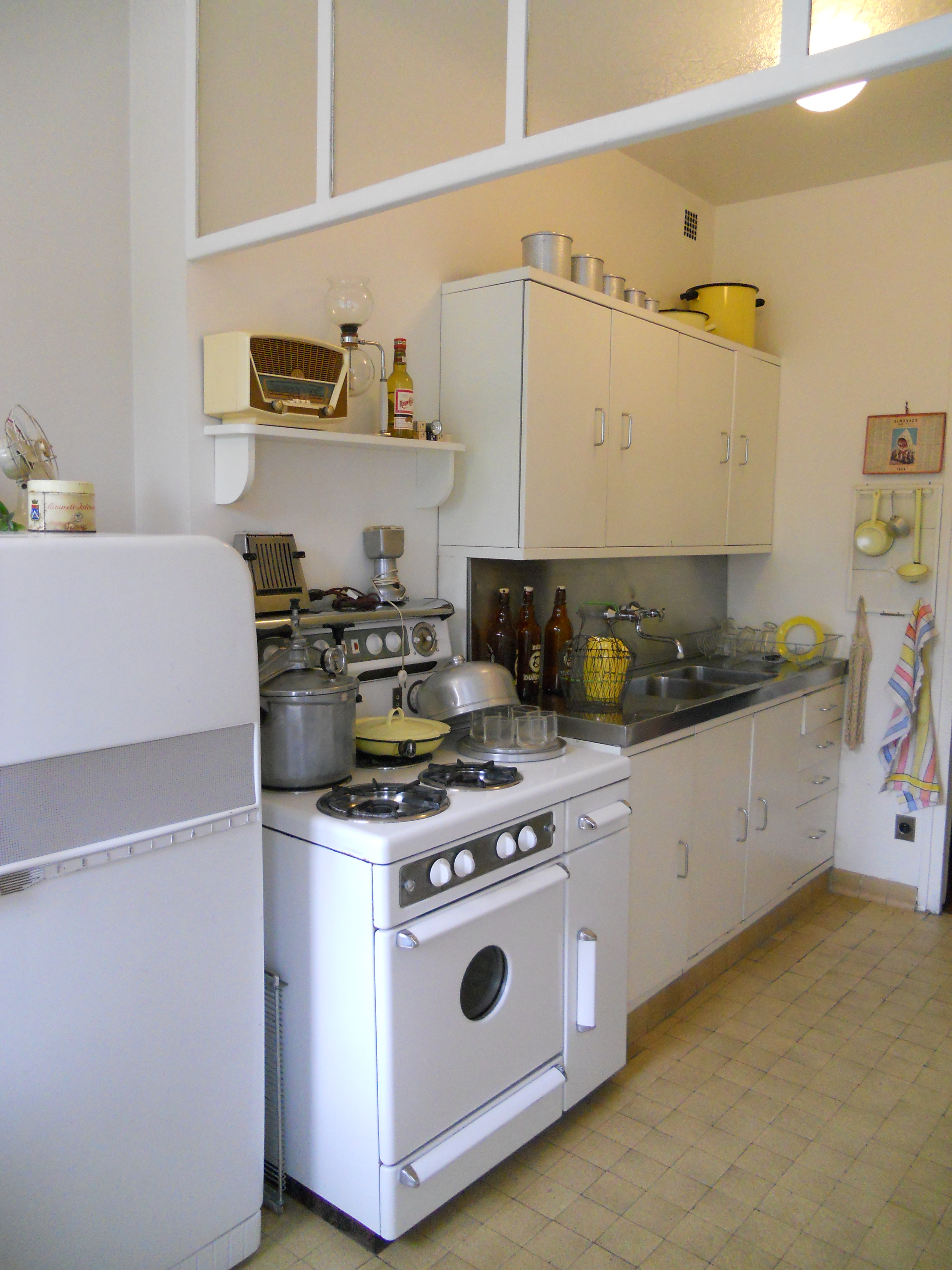 Cuisine de l'appartement Témoin Perret au Havre. Elle est composée de meubles SEPAC de 1946 dans le "style reconstruction" (comparable au Style 58 en Belgique). Cette salle de long séjour, bien éclairée par une fenêtre, mesure 8 m² et est divisée en deux par une parois de verre au plafond qui sert de hotte. Elle donne sur l'entrée et sur la salle de séjour dont elle peut être séparée par une porte en accordéon.